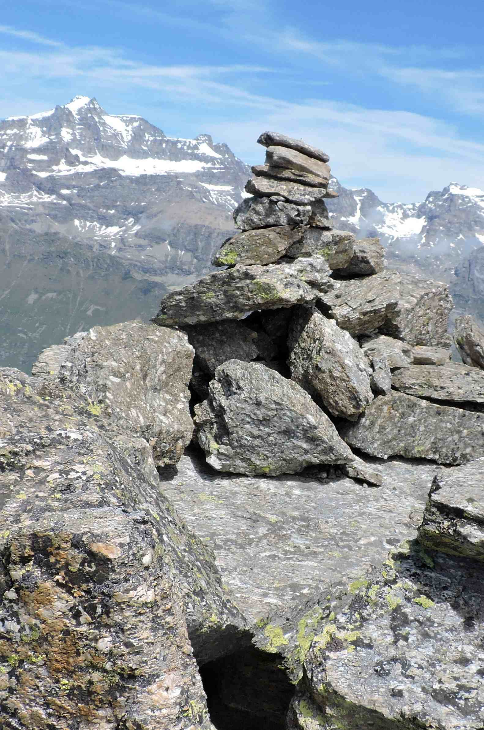 Monte Bellagarda (Alpi Graie): l'ometto sulla cima, cullo sfondo il Gran Paradiso